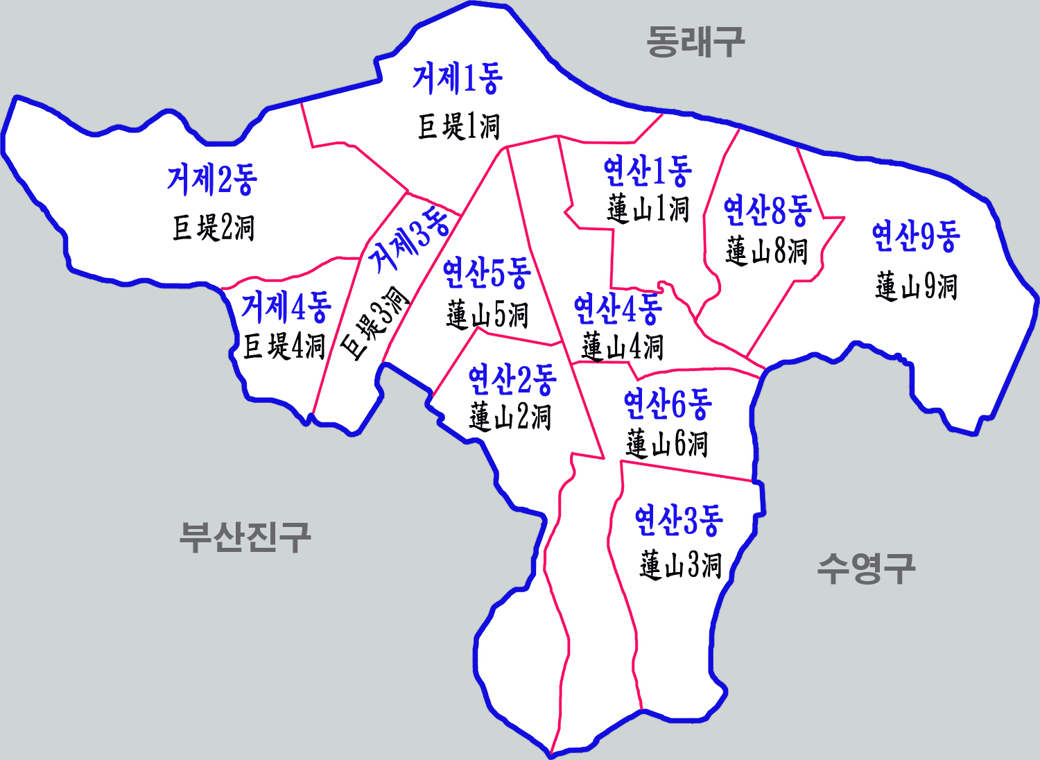 부산연제구 행정구역도